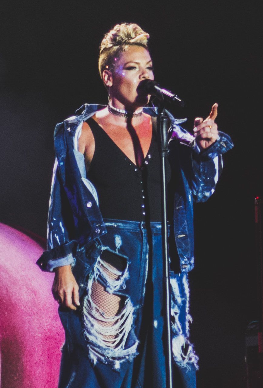 PinkVFest190817-17